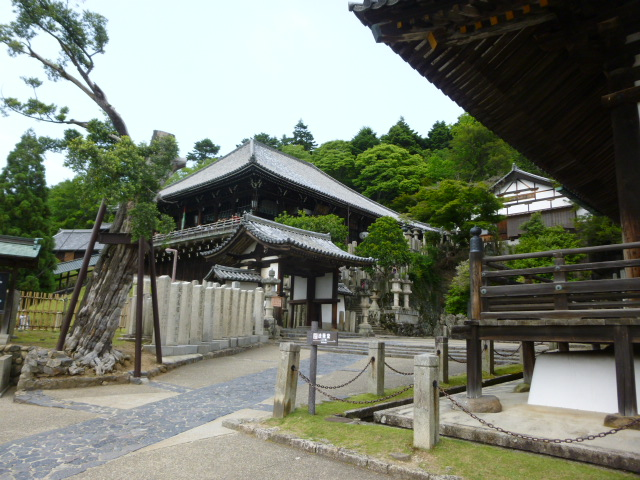 東大寺二月堂